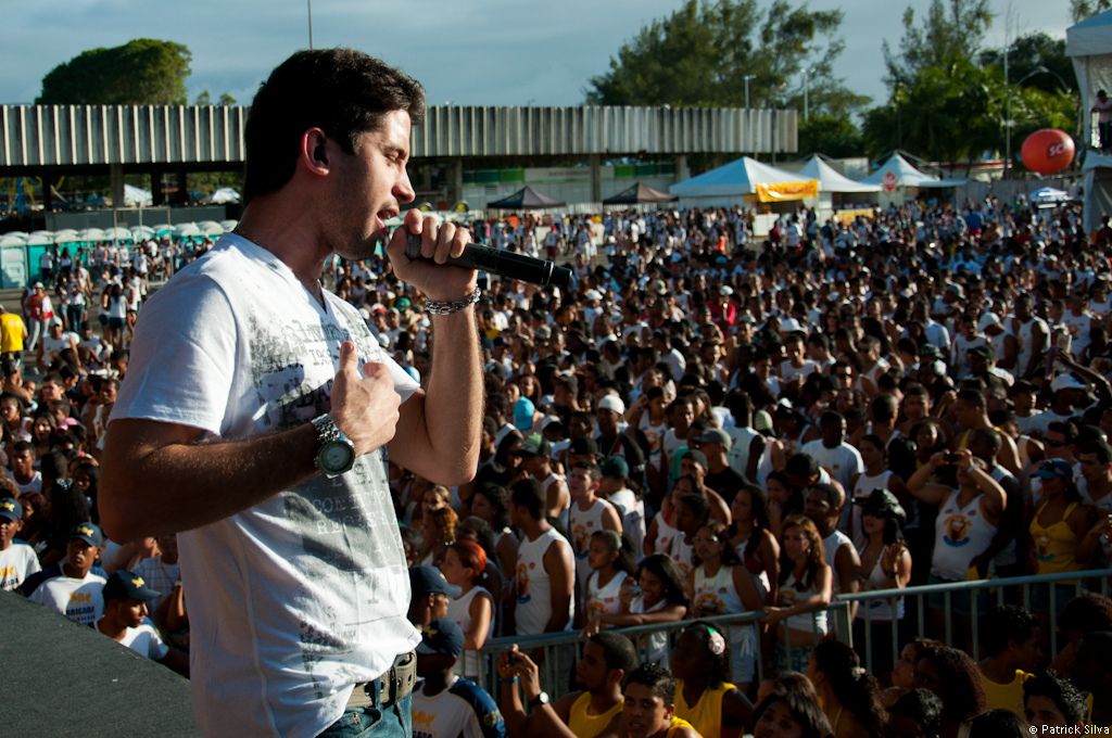 A banda Cavaleiros do Forró foi a segunda atração da Choppada de Medicina 2011, no Parque de Exposições de Salvador. O evento ocorreu em 06/08/2011 e teve público estimado em 20 mil pessoas. Foto: Patrick Silva